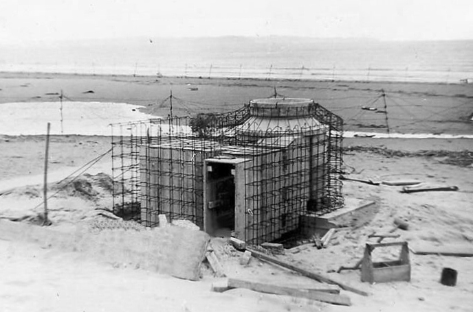 Esempio di costruzione di un Tobruk sull'isola di Creta